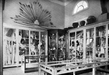 Imagem de sala de exposição publicada no Guia da Secção Histórica do Museu Paulista em 1937, s/n. Acervo do Museu Paulista.